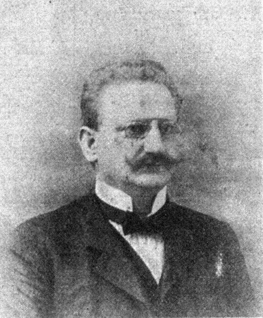 Österreichischer Politiker, Reichsratswahl 1907, Name siehe Dateiname